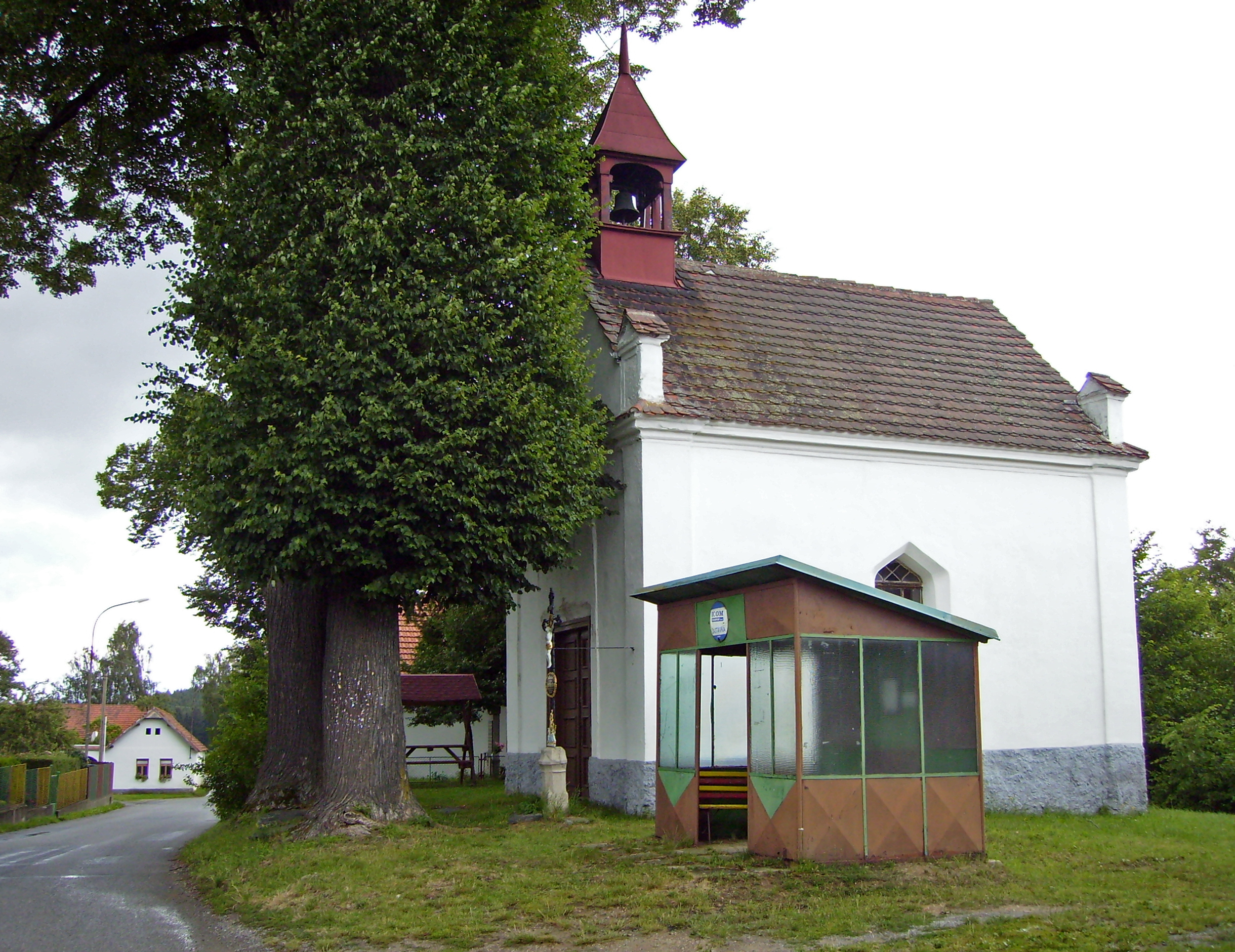 Kaplička v obci Eš v kraji Vysočina